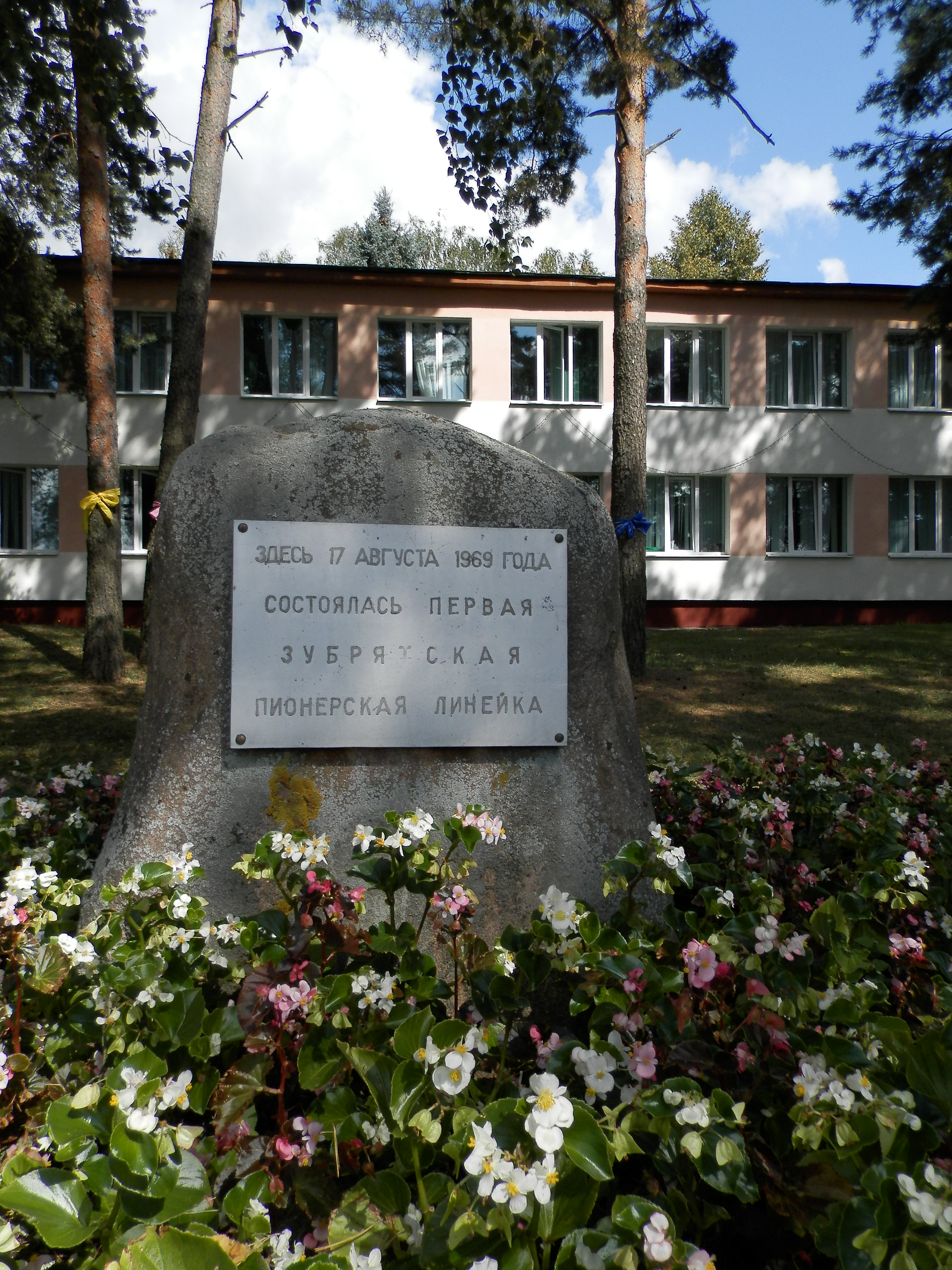 НДЦ "Зубрёнок". Памятный знак в честь первой пионерской линейки